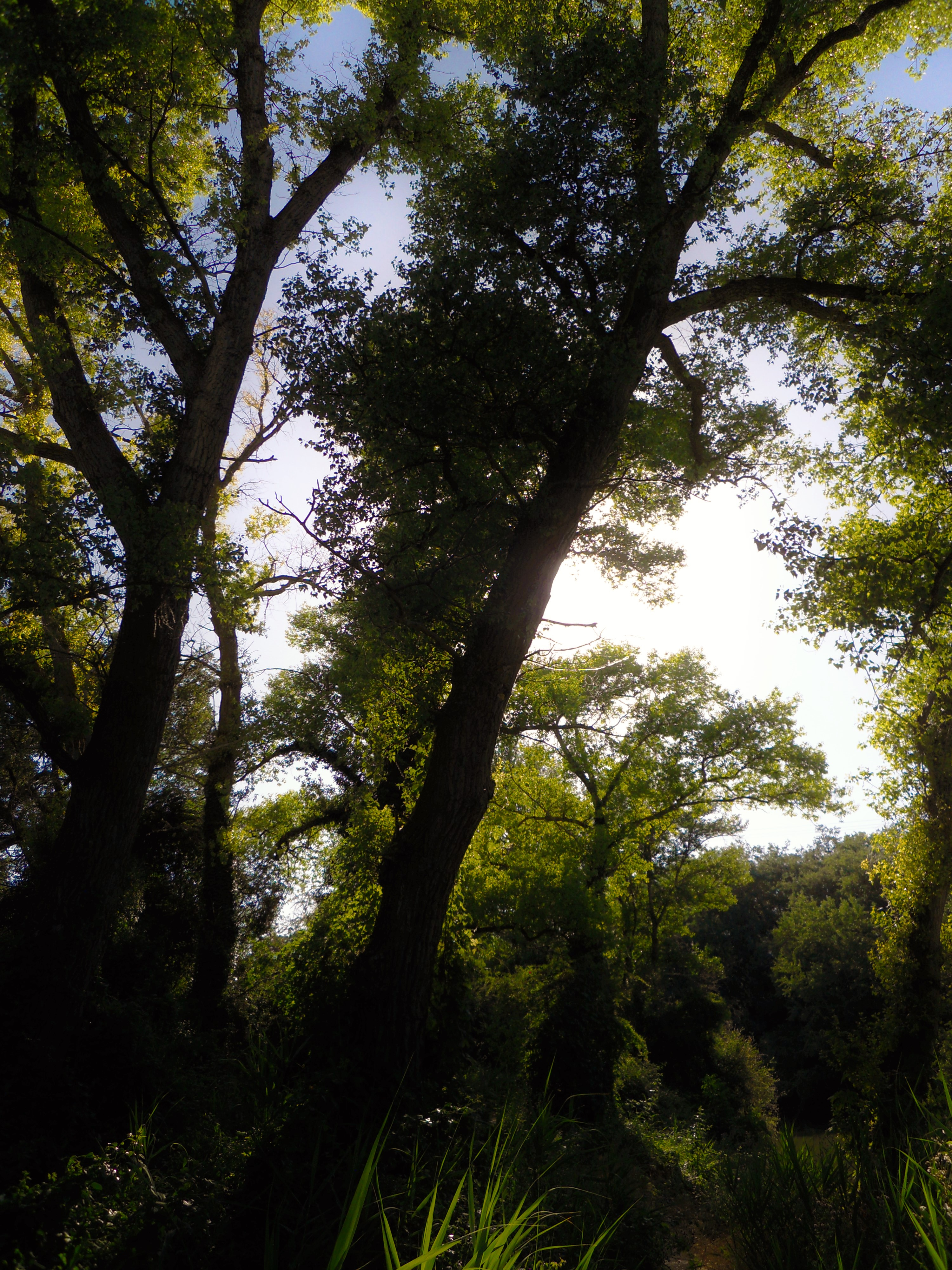 Bosque de ribera